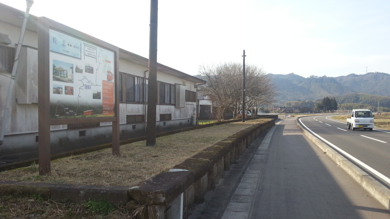 道路建設が進み、かつての簡易駅舎の基礎跡は撤去されているが、プラットフォーム跡と記念碑が残っている。